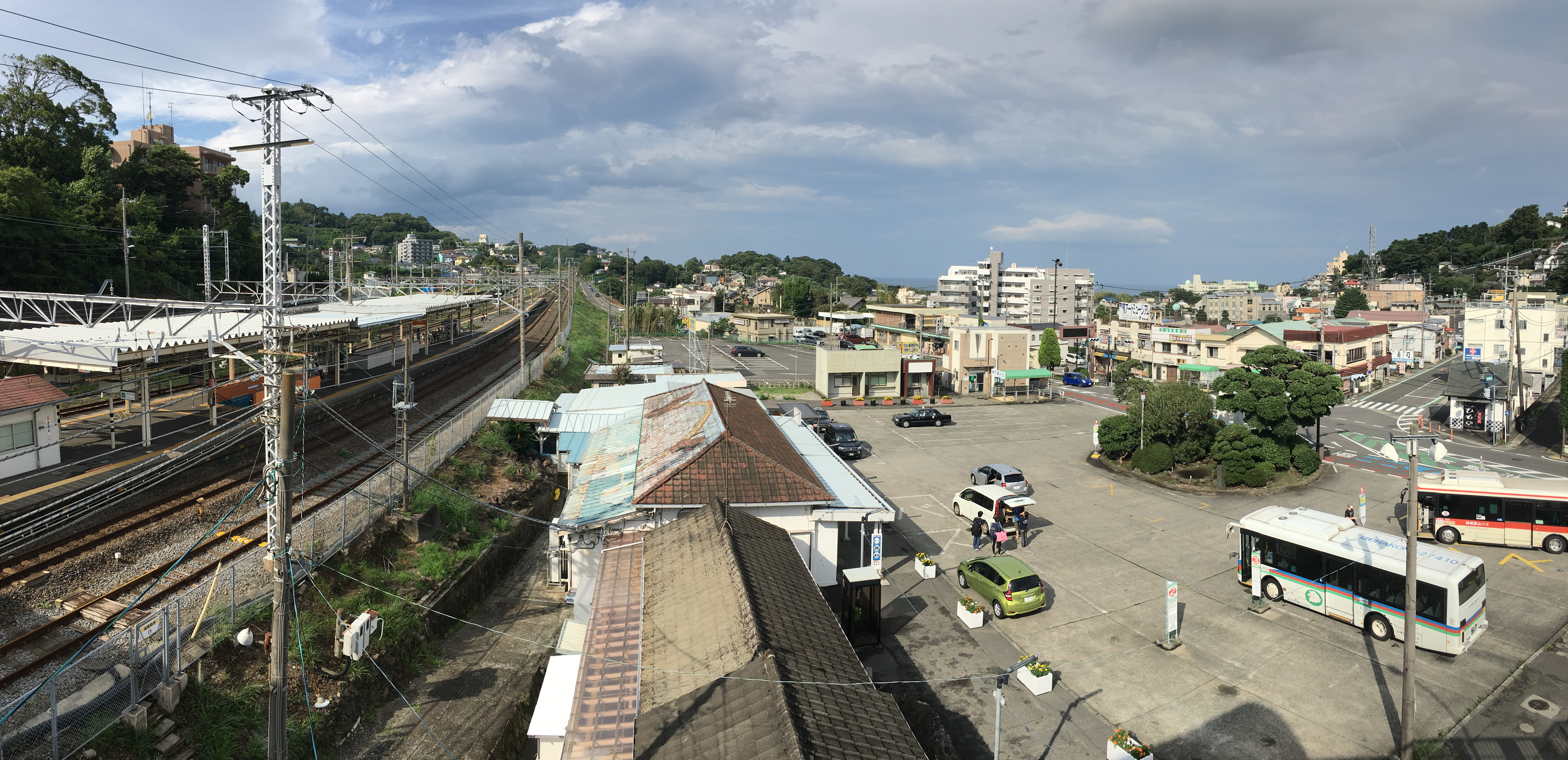 真鶴駅 (Manazuru Station)